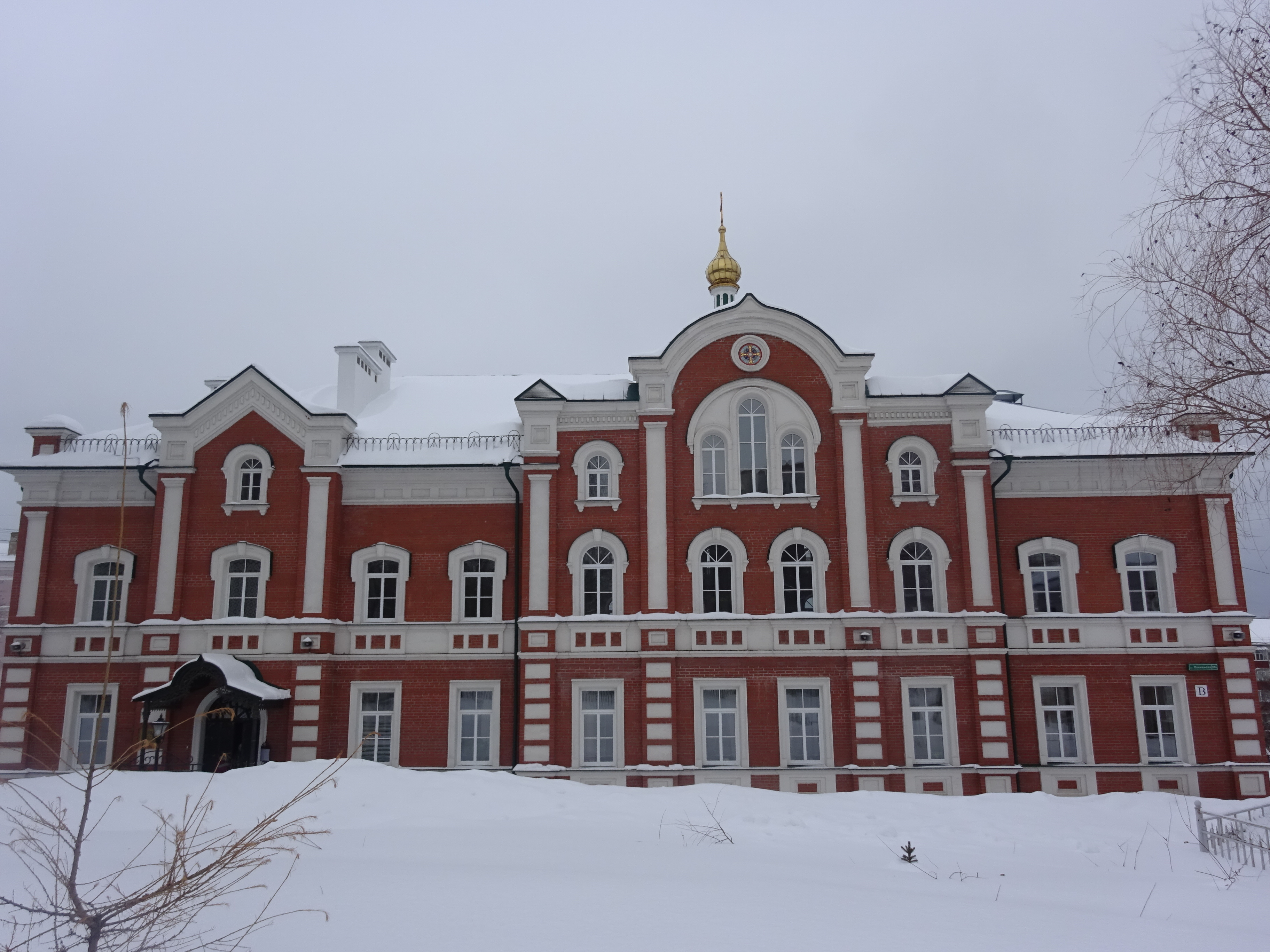 Храм во имя Иоанна Богослова Успенского женского монастыря в Перми